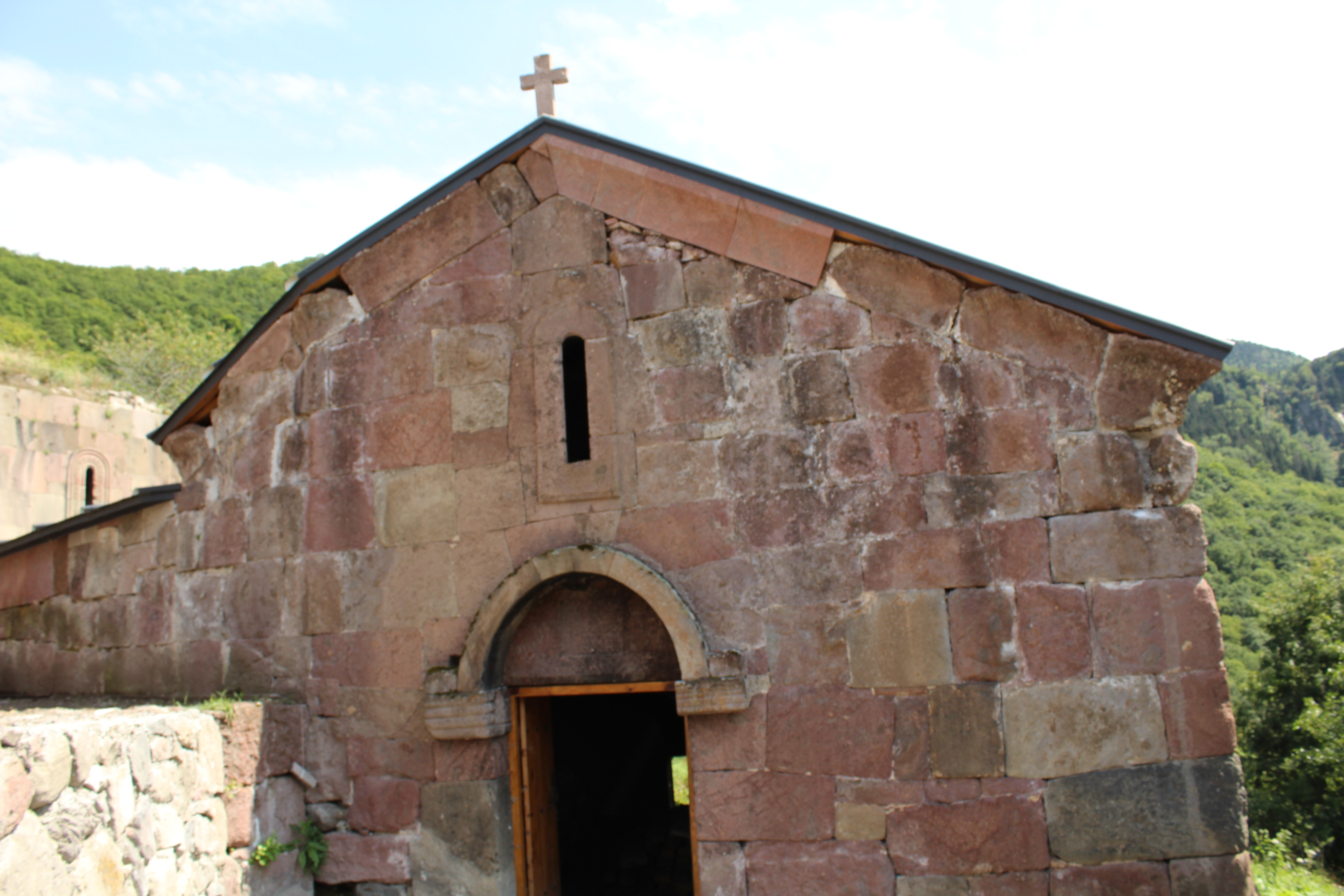 მთავარი ეკლესია